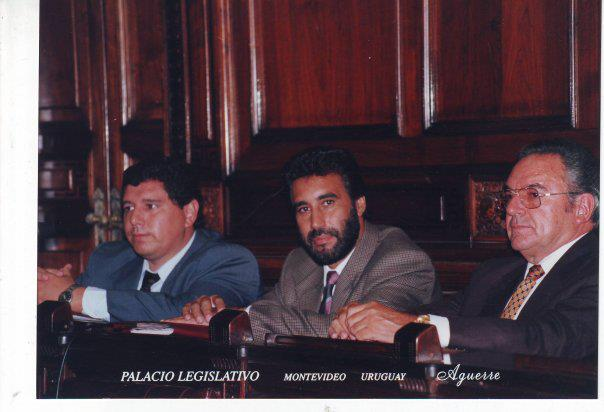 Los Diputados José Hualde (izquierda) y Julio Lara (al centro)